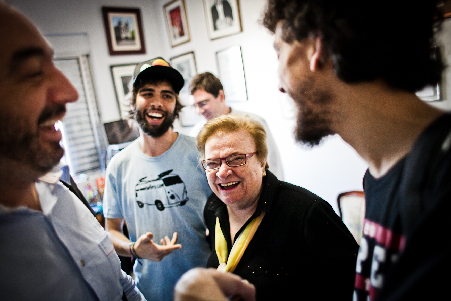 TV Fórum com Luiza Erundina, Renato Rovai e Sérgio Amadeu. O programa da Fórum na #PosTV traz para o debate a deputada federal Luiza Erundina (PSB) direto de seu gabinete em São Paulo. Participam da conversa Renato Rovai e Sérgio Amadeu. 02/07/12 (CC BY-SA) Fora do Eixo